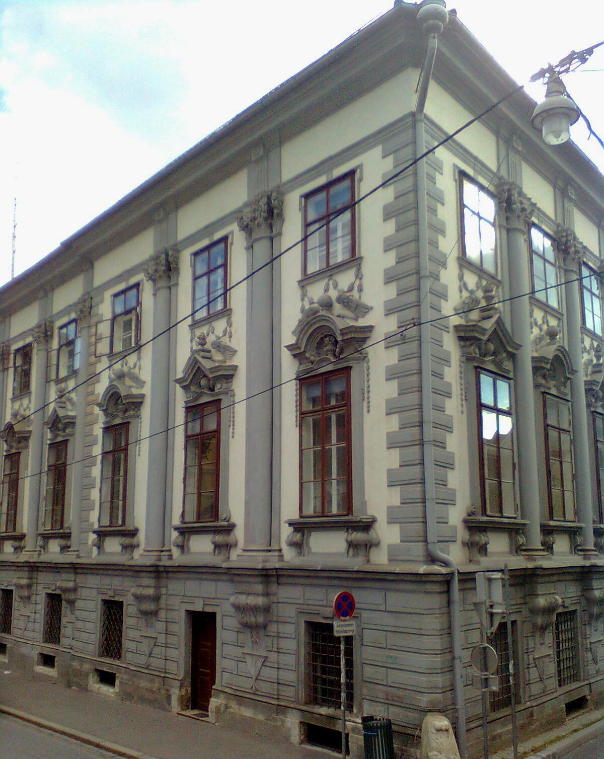 Palais Wildenstein, Graz, Paulustorgasse